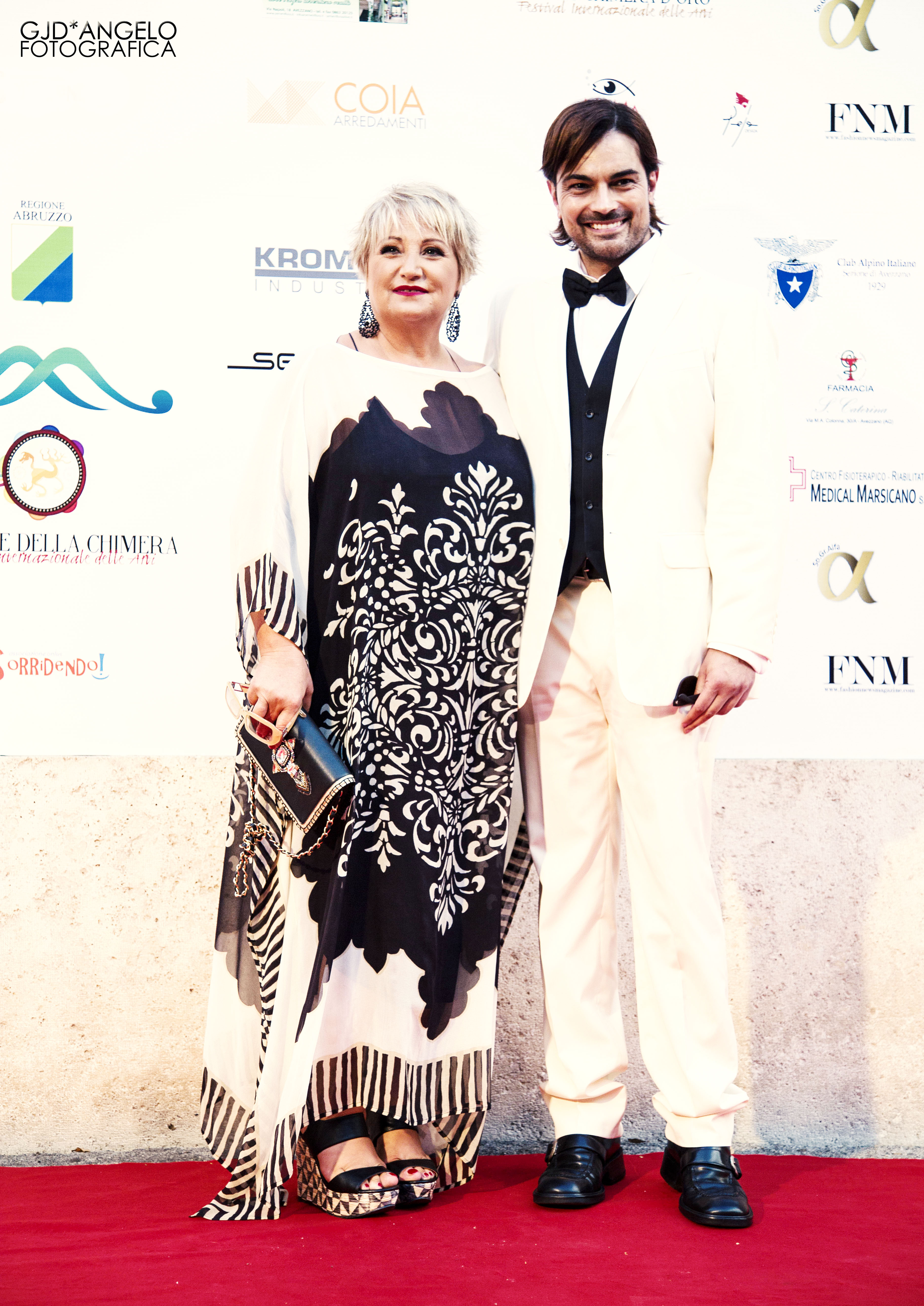 Germano Di Mattia con Franca Di Cicco